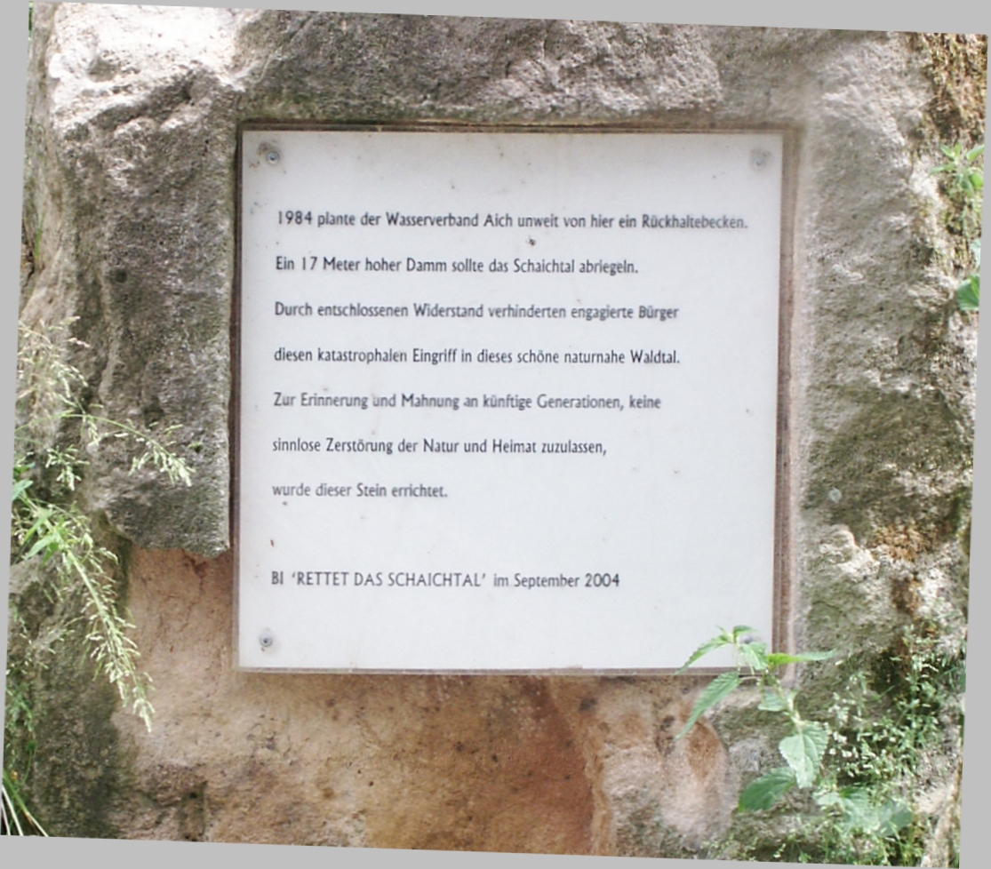 Gedenkstein der BI "Rettet das Schaichtal"